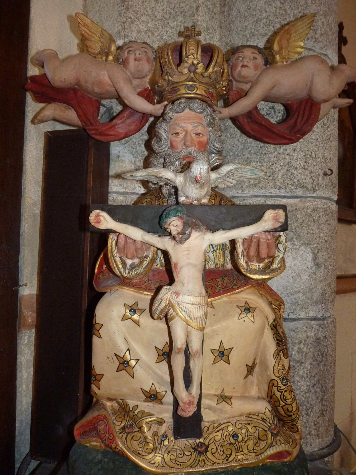 Une jolie représentation polychrome de la Sainte Trinité